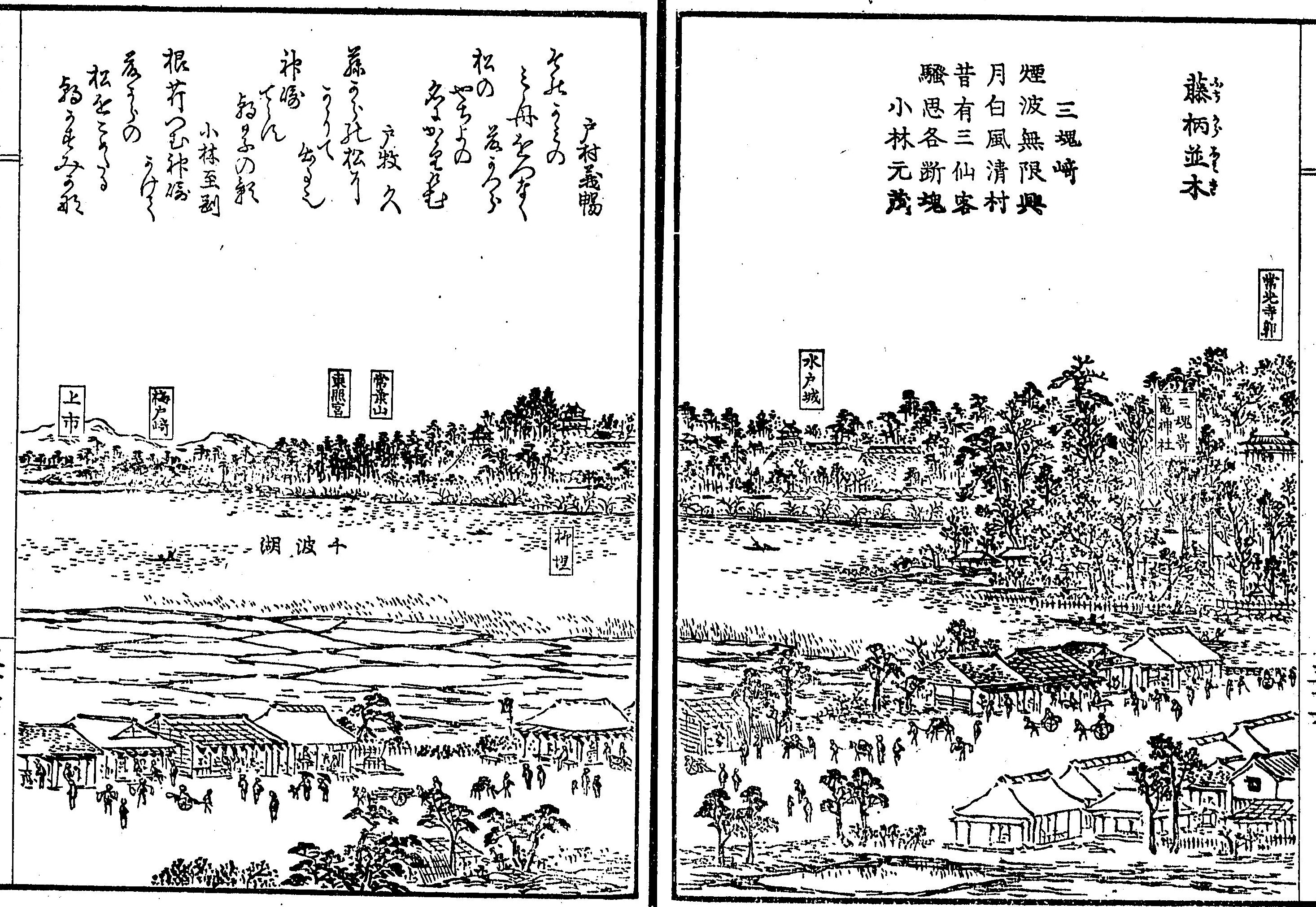 千波湖の図/藤柄並木(『茨城常盤公園攬勝図誌』松平俊雄 著 YDM23693 (マイクロフィッシュ) )コマ番号90 改編 国立国会図書館デジタルコレクション:インターネット公開（保護期間満了）